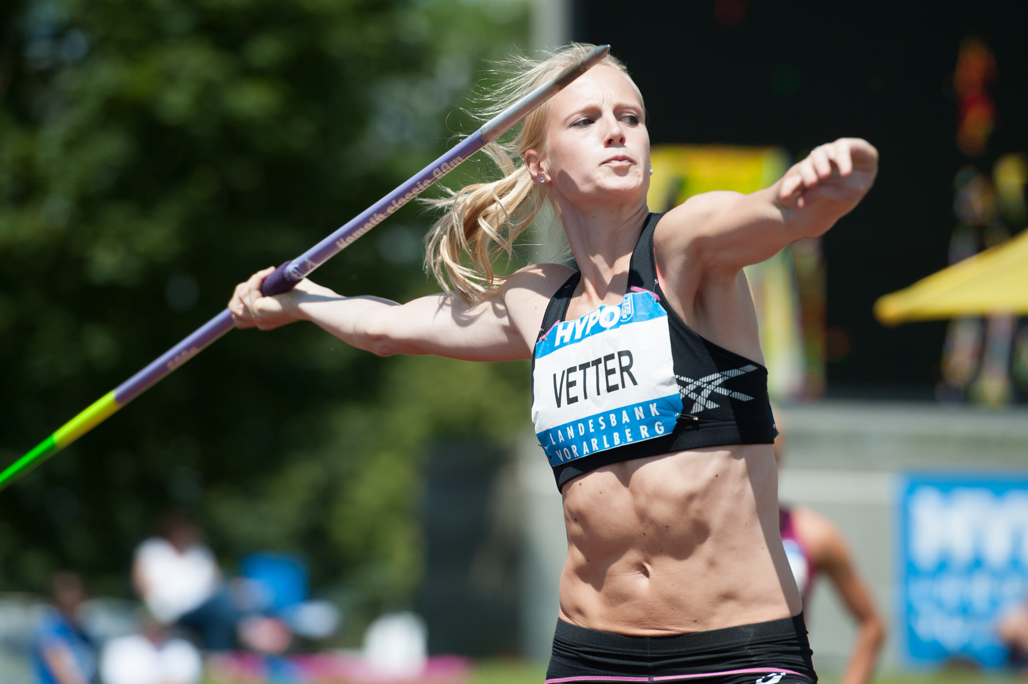 Anouk Vetter in actie tijdens de Hypo-Meeting 2014 in Götzis